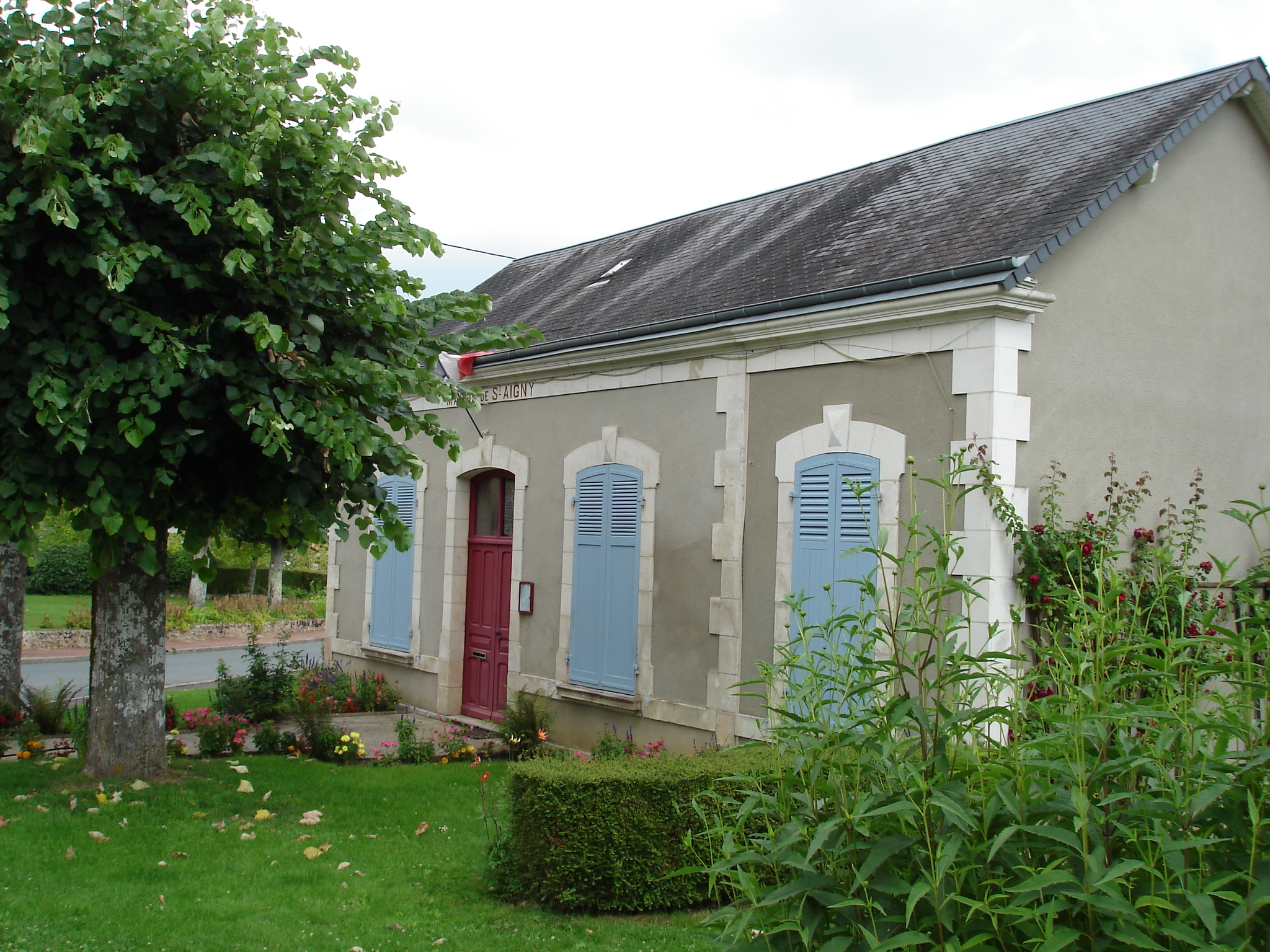 Saint-Aigny (36) : La mairie.